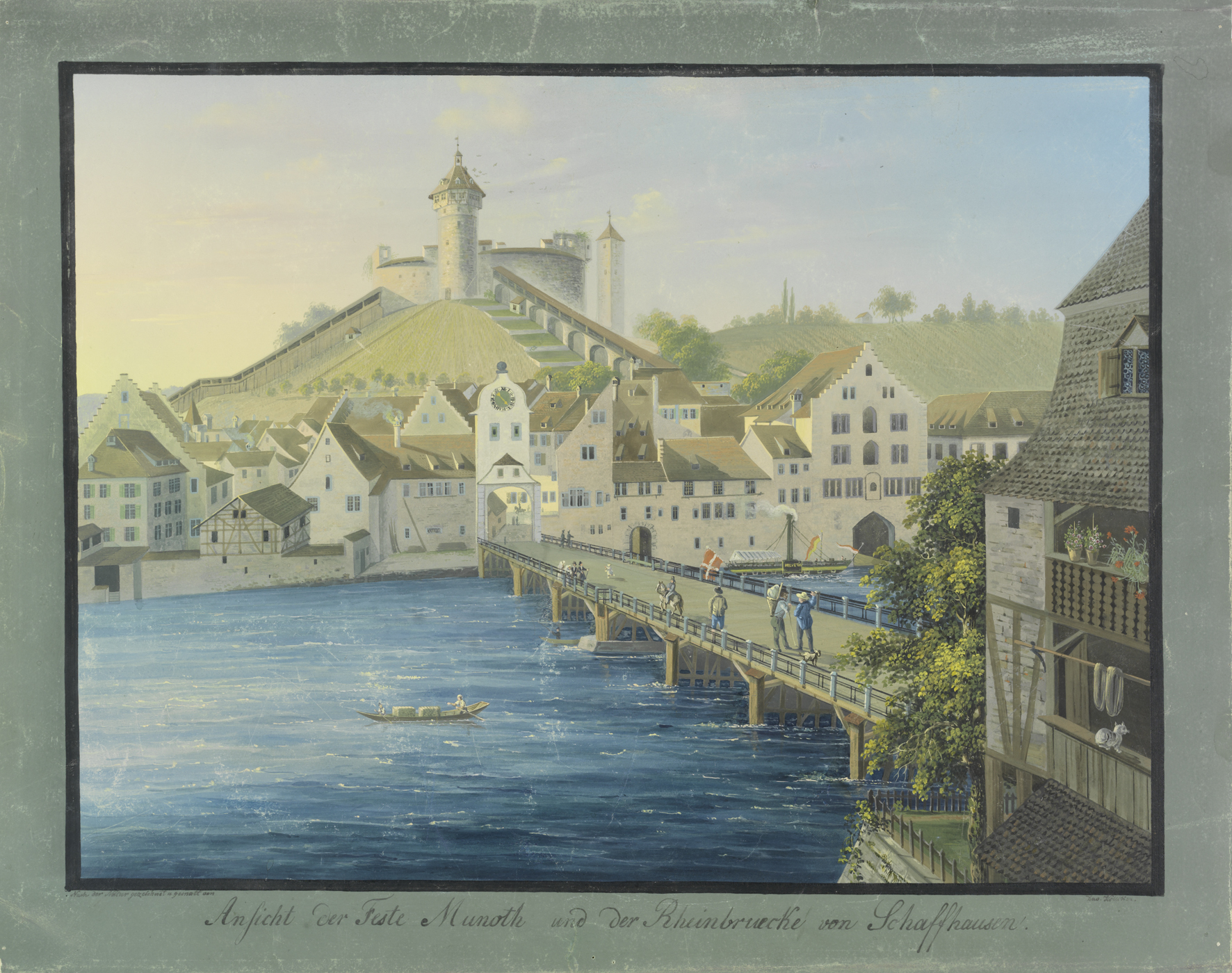 Ansicht der Feste Munoth und der Rheinbruecke von Schaffhausen. Gouache. Bild: 31.5 x 41.7 cm; Museum zu Allerheiligen, Schaffhausen